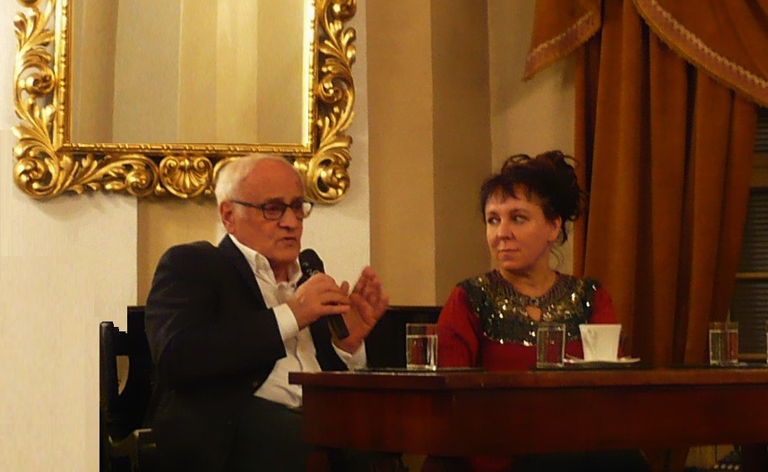 Leo Kantor i Olga Tokarczuk w Kłodzku, 20.10.2016 r.